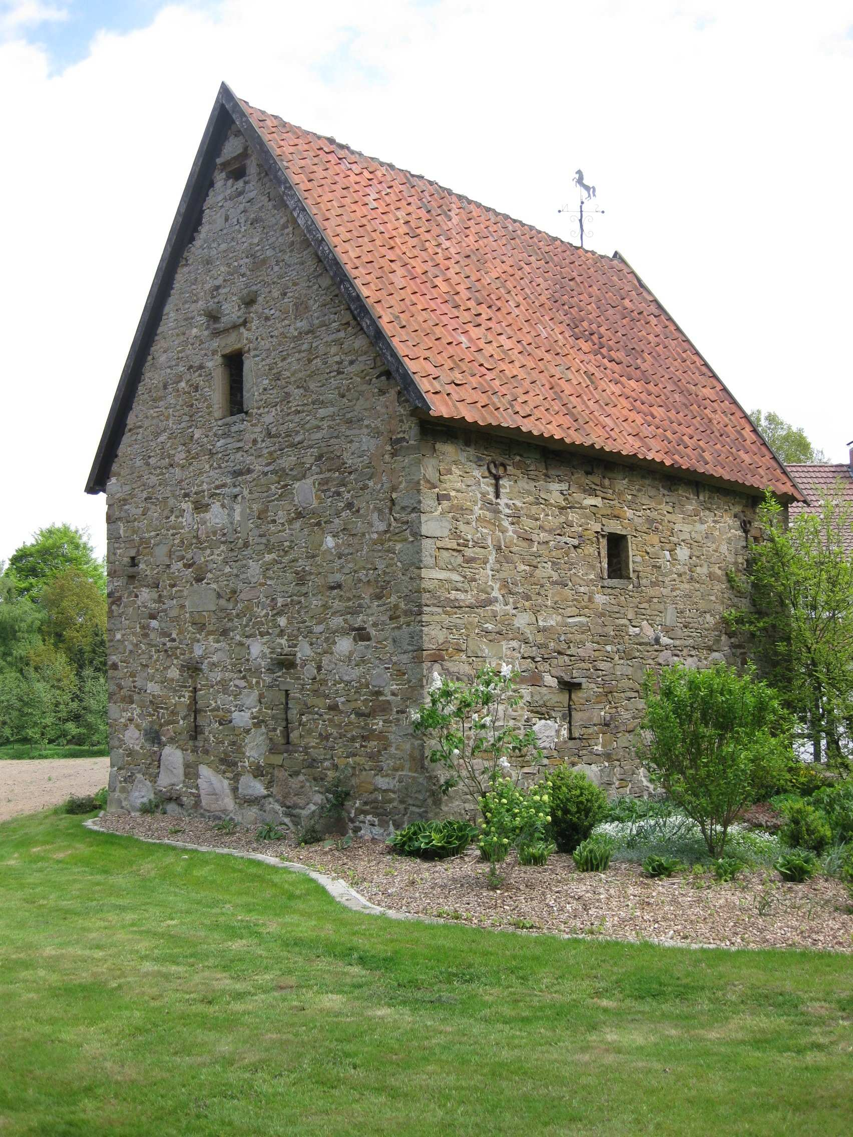 Ländliches Steinwerk in der Gemeinde Ankum